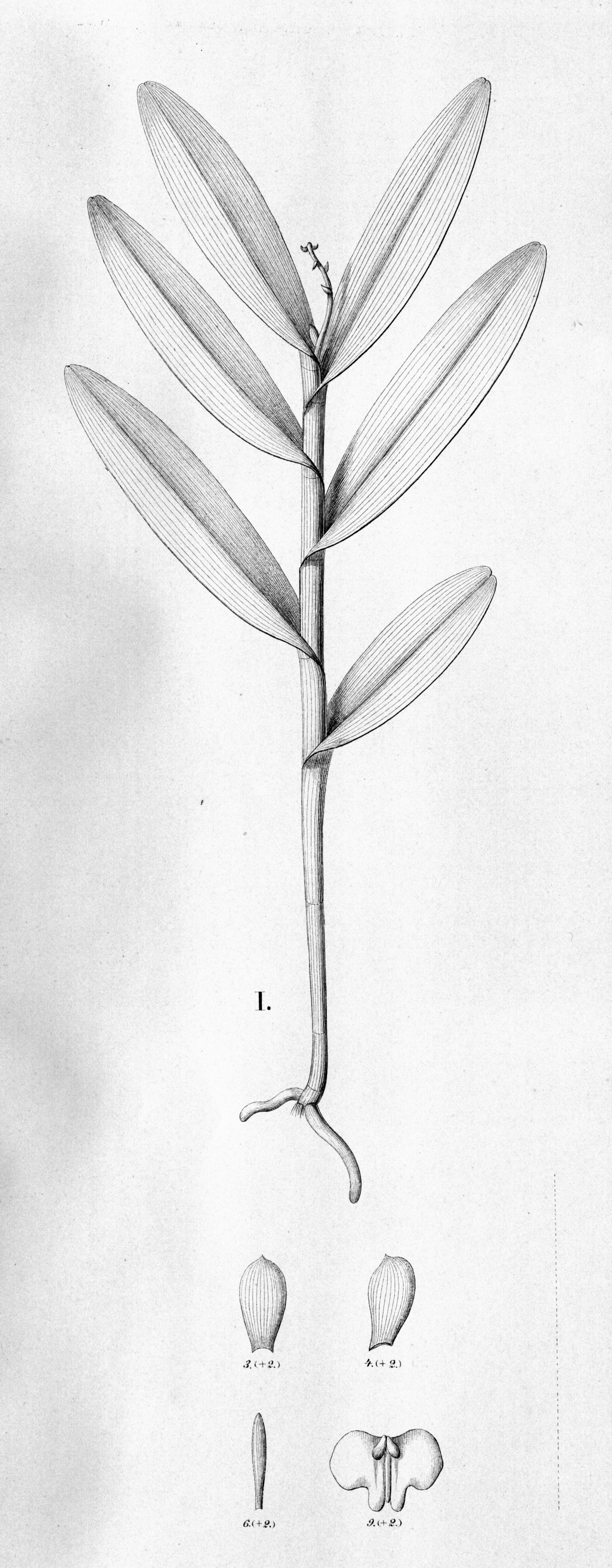 Illustration of Epidendrum henschenii